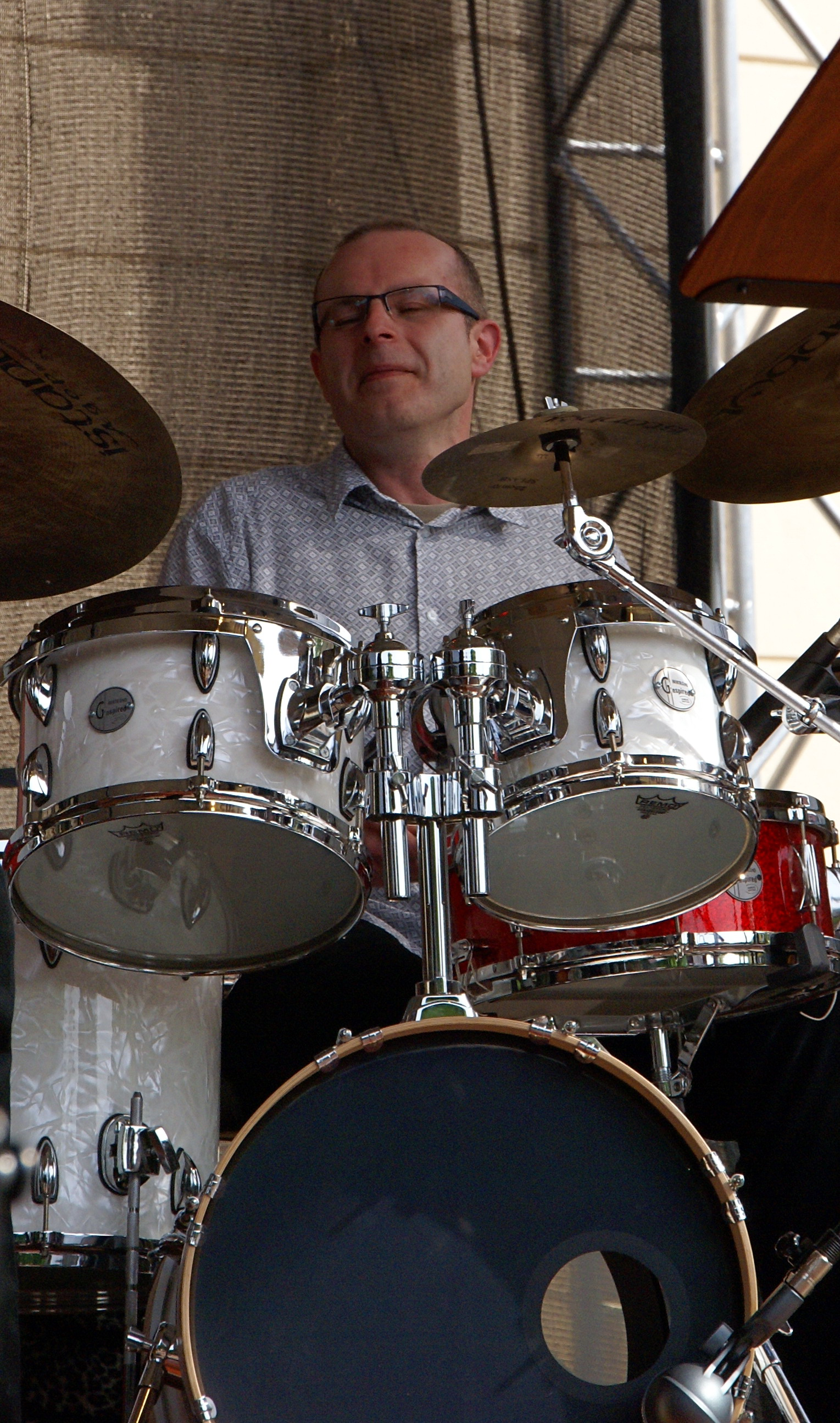 Marcin Jahr podczas koncertu "Kalejdoskop Chopinowski", Bydgoszcz 29.05.2010